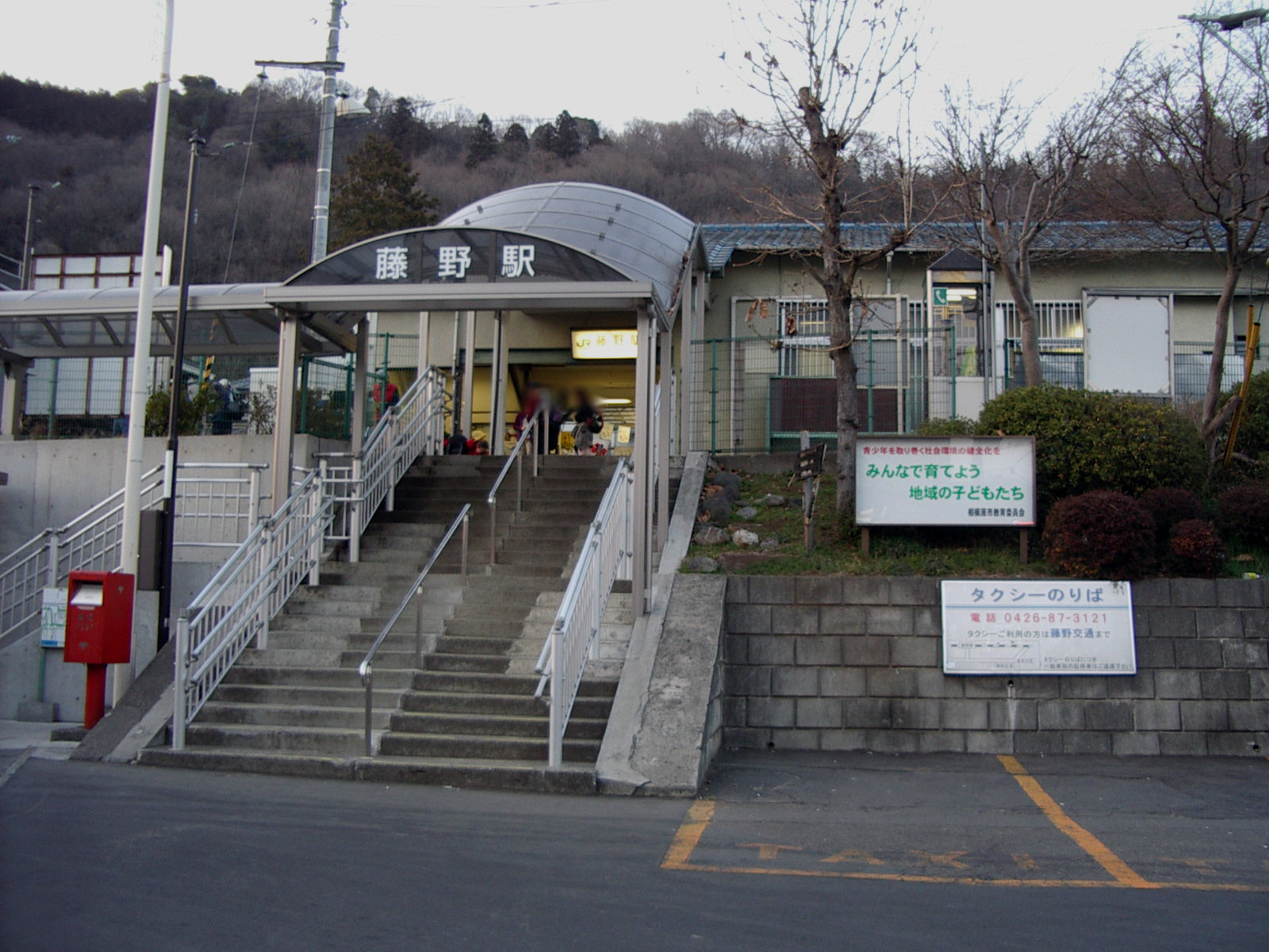 JR藤野駅駅正面